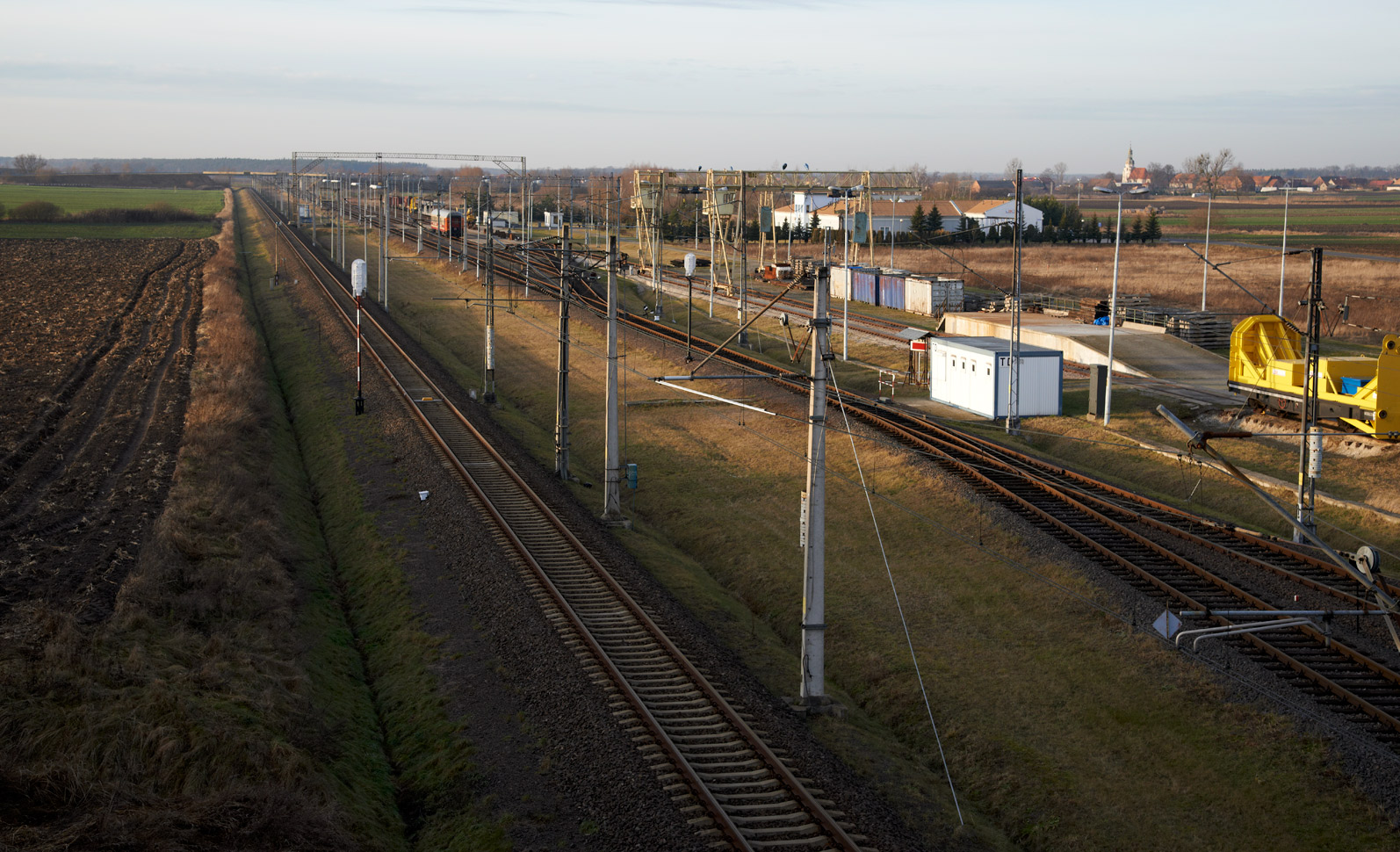 Tor doświadczalny w Węglewie. Widok na stację zakładową.